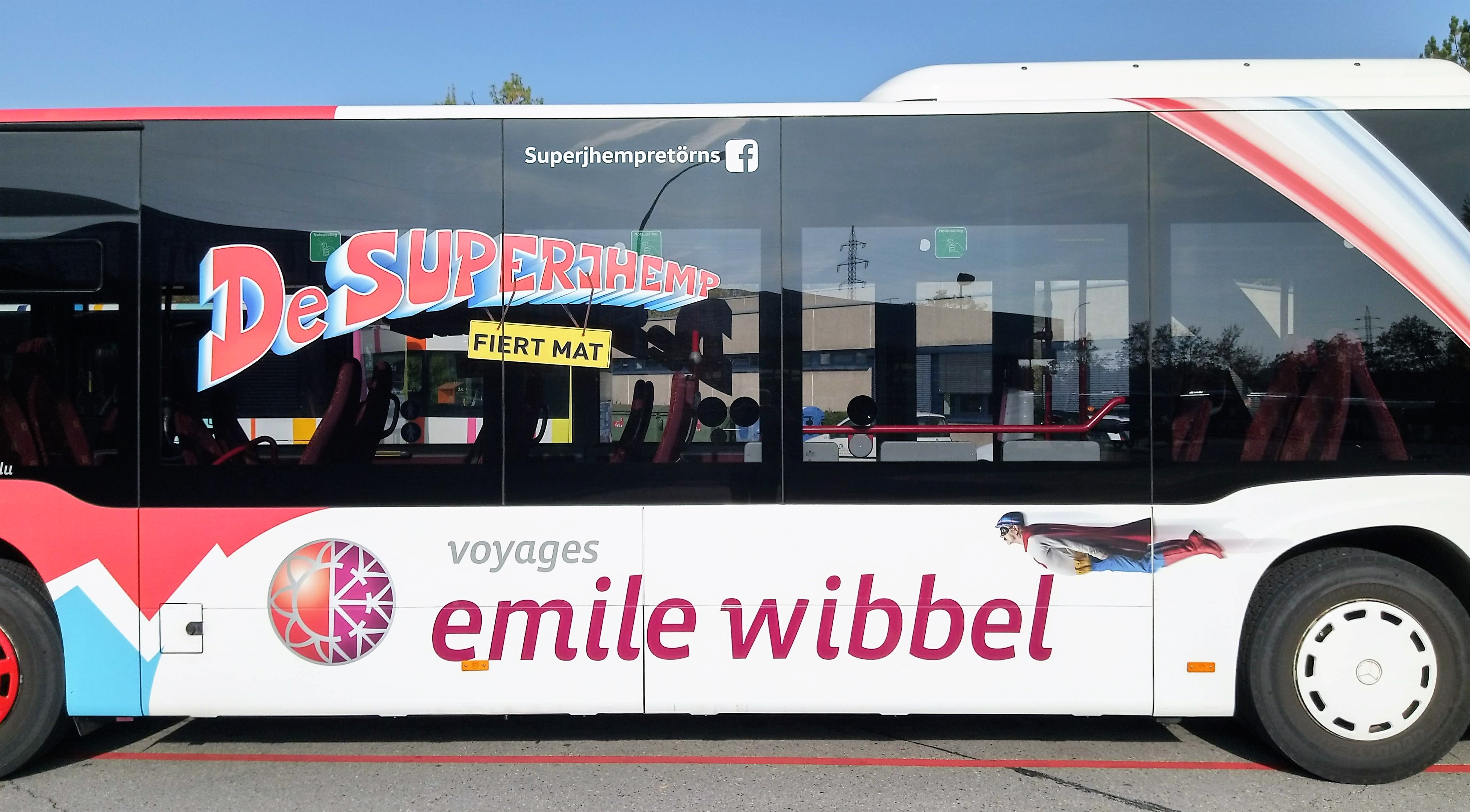 E Bus vun "Emile Wibbel" am Design vum Film "De Superjhemp retörns".